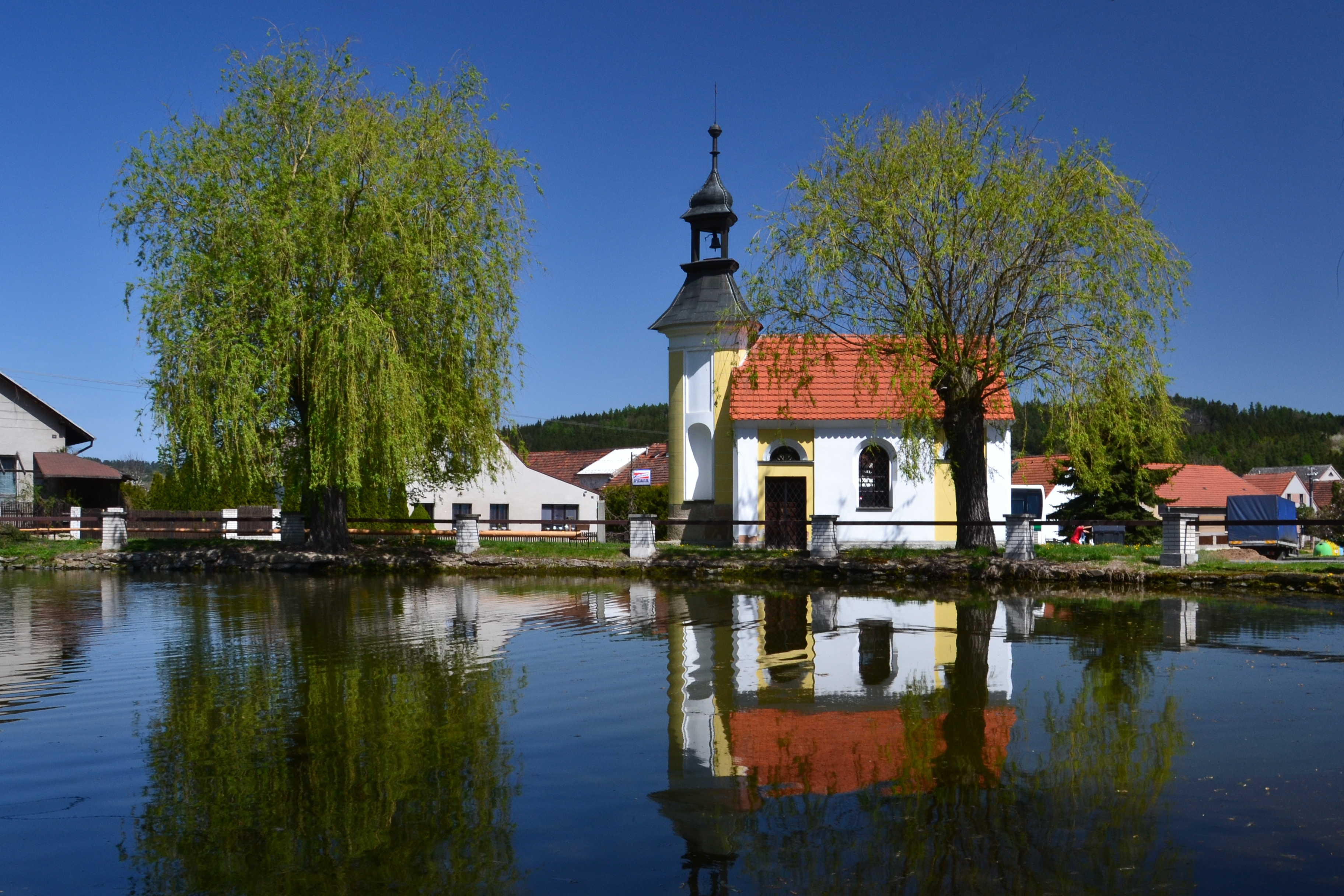 Nadryby – kaple svatého Antonína Paduánského (pohled z jihozápadu)